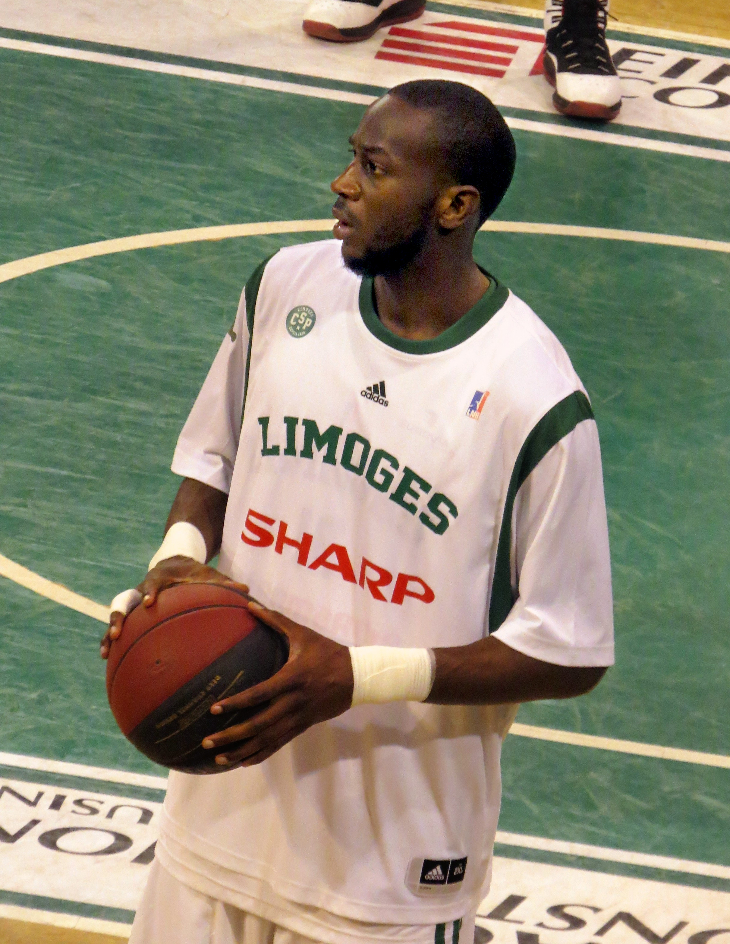 échauffement